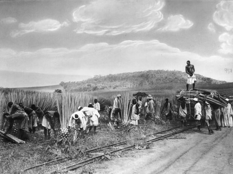 Sisalernte